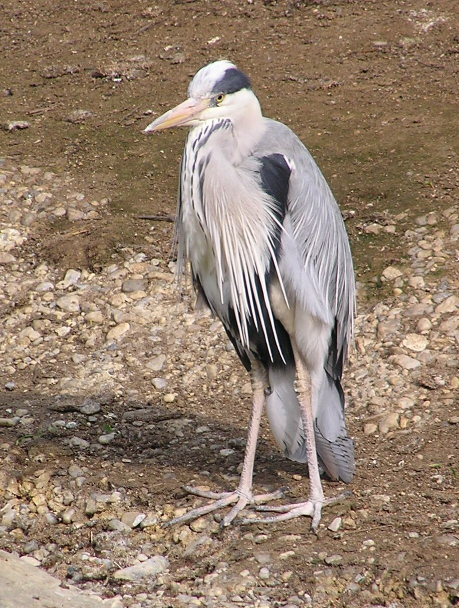 Ardea cinerea